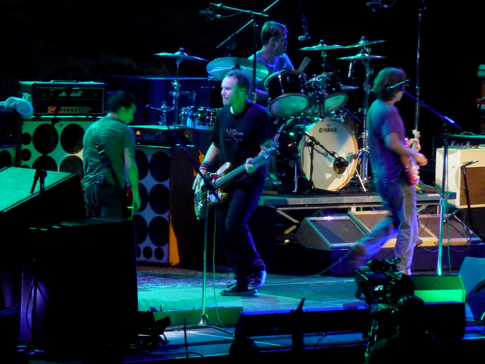 August 2009